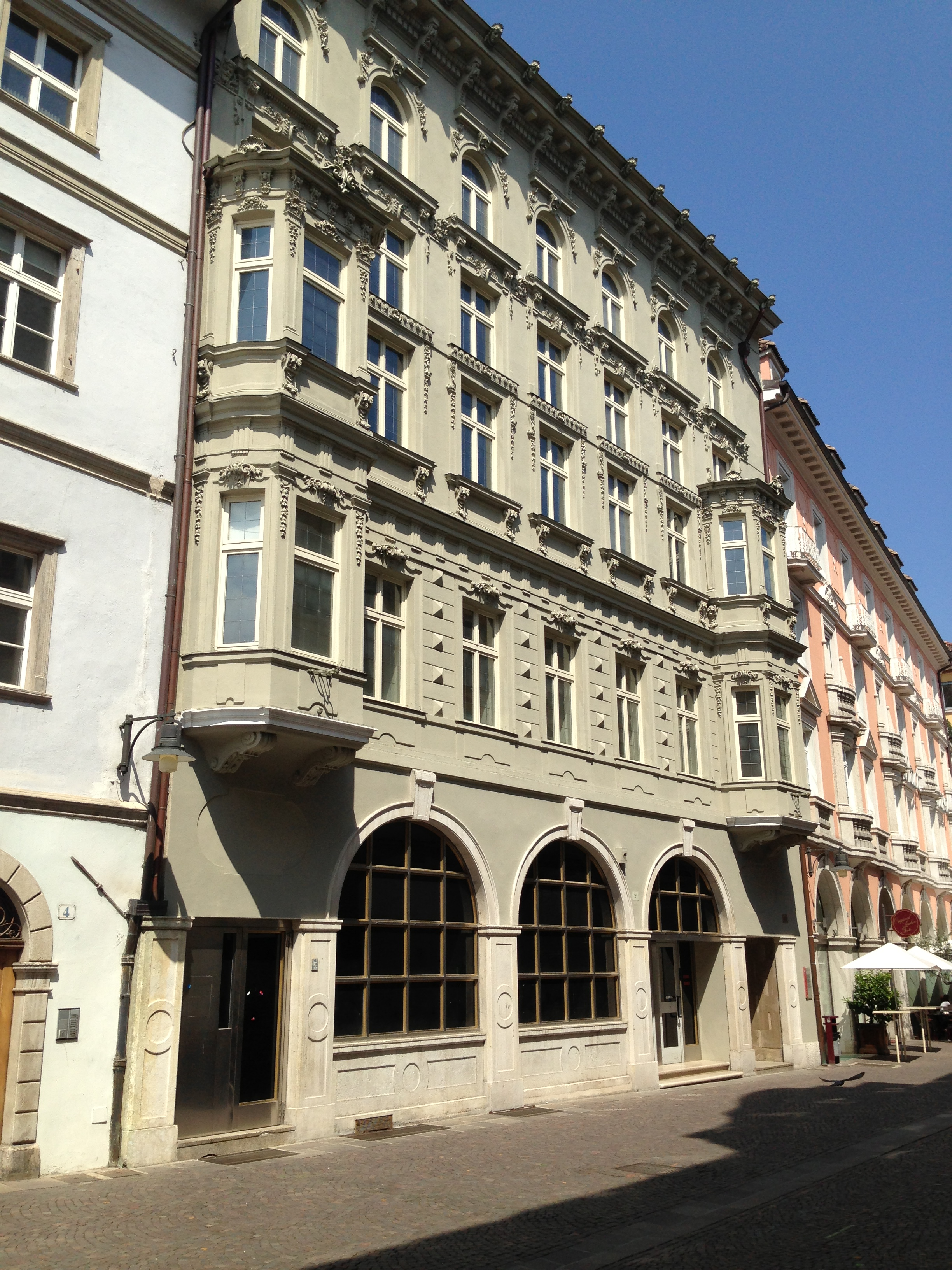 Palais Menz in Bozen in der Mustergasse